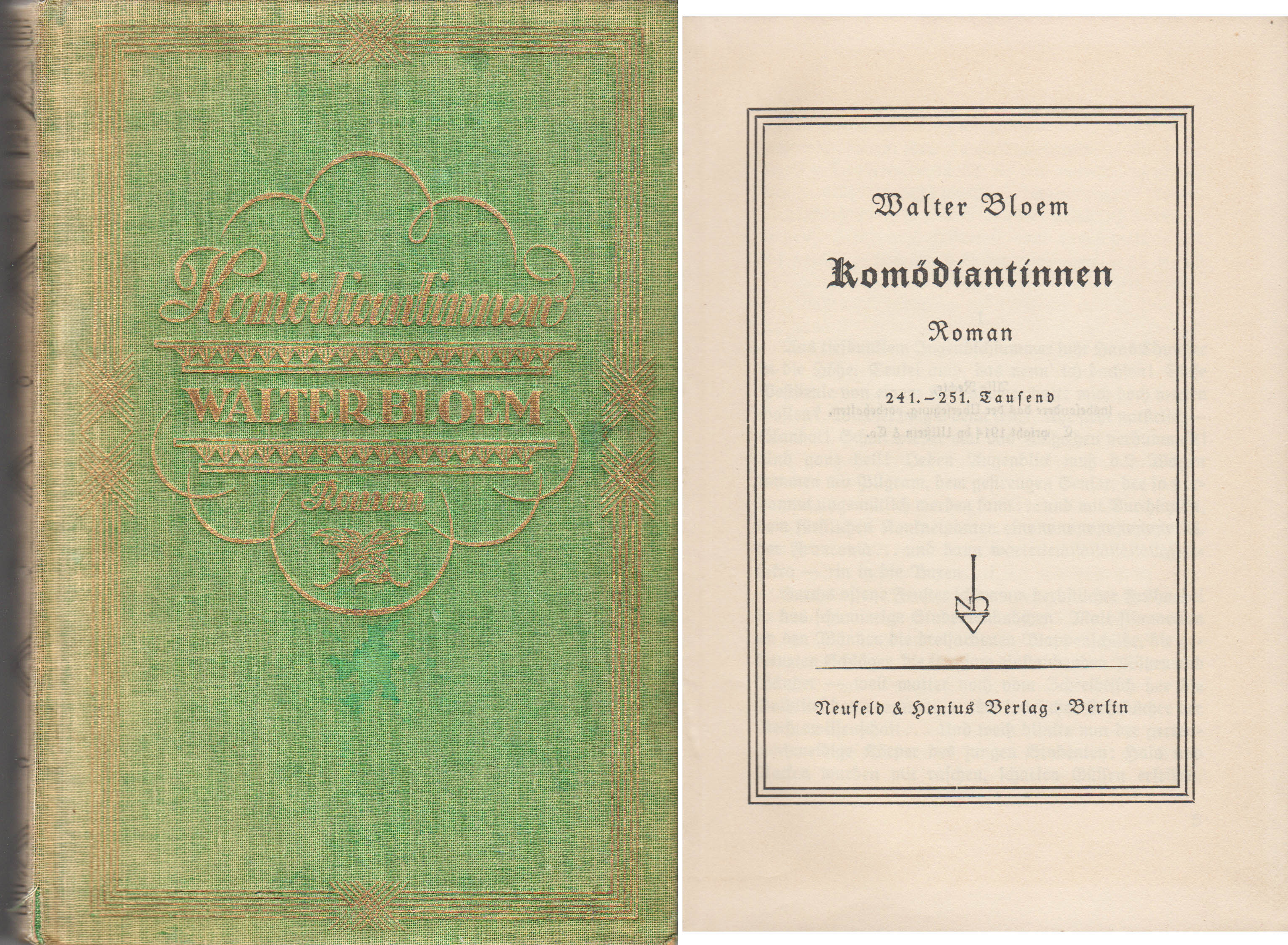 Die Komödiantinnen, Autor Walter Bloem, Neufeld & Henius Verlag Berlin 1914